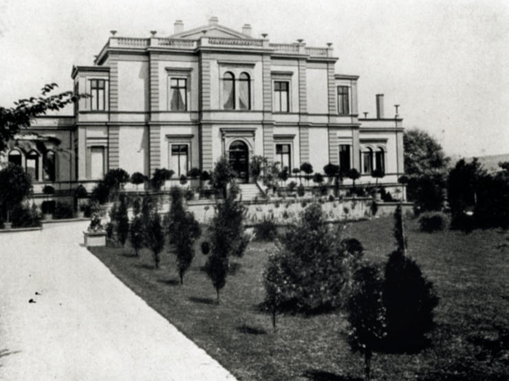 Deutschland, Bonn: Villa Hammerschmidt um 1870 (aktuelle Nutzung: zweiter Amtssitz des deutschen Bundespräsidenten).